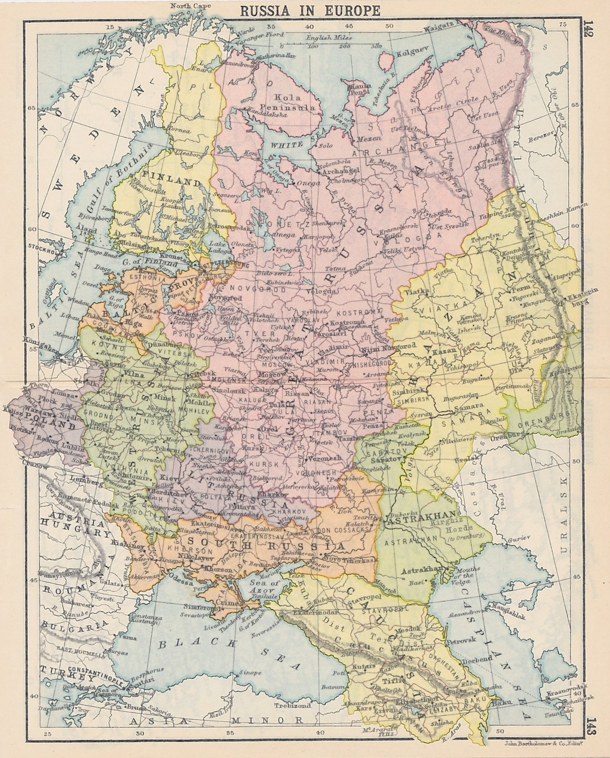 Европейская часть Российской империи